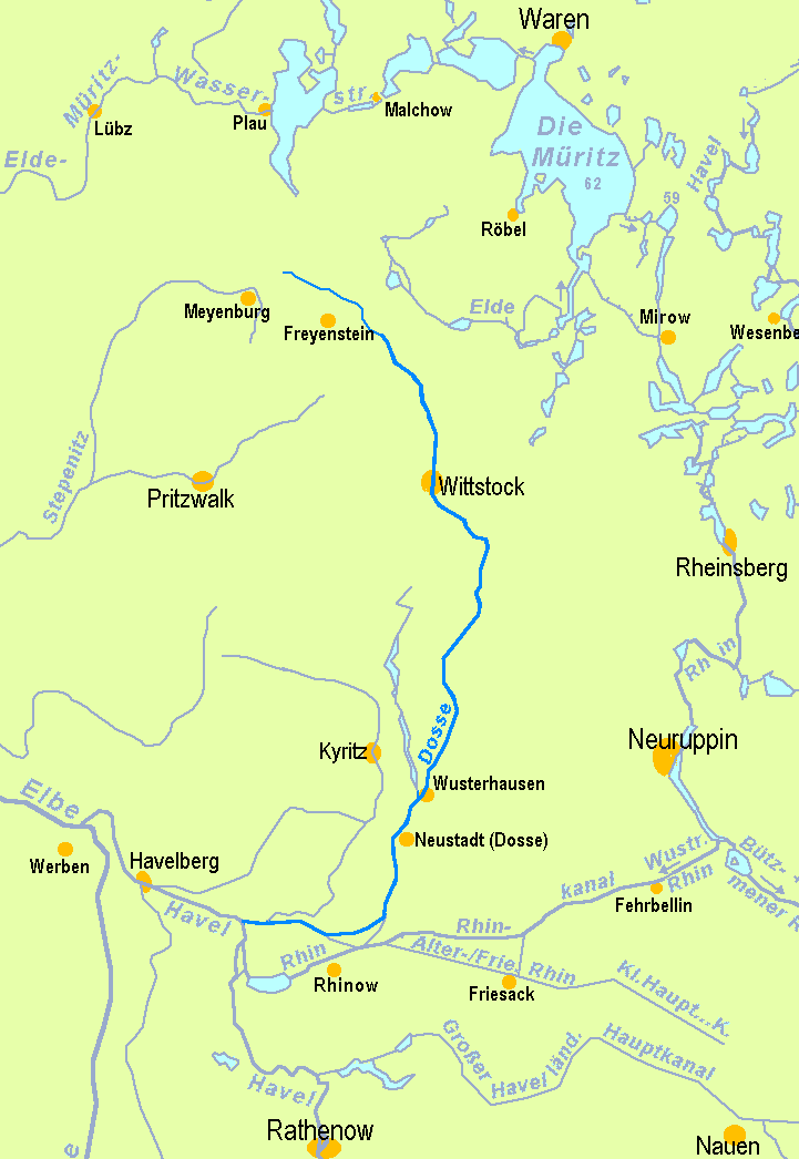 Lage und Verlauf der Dosse